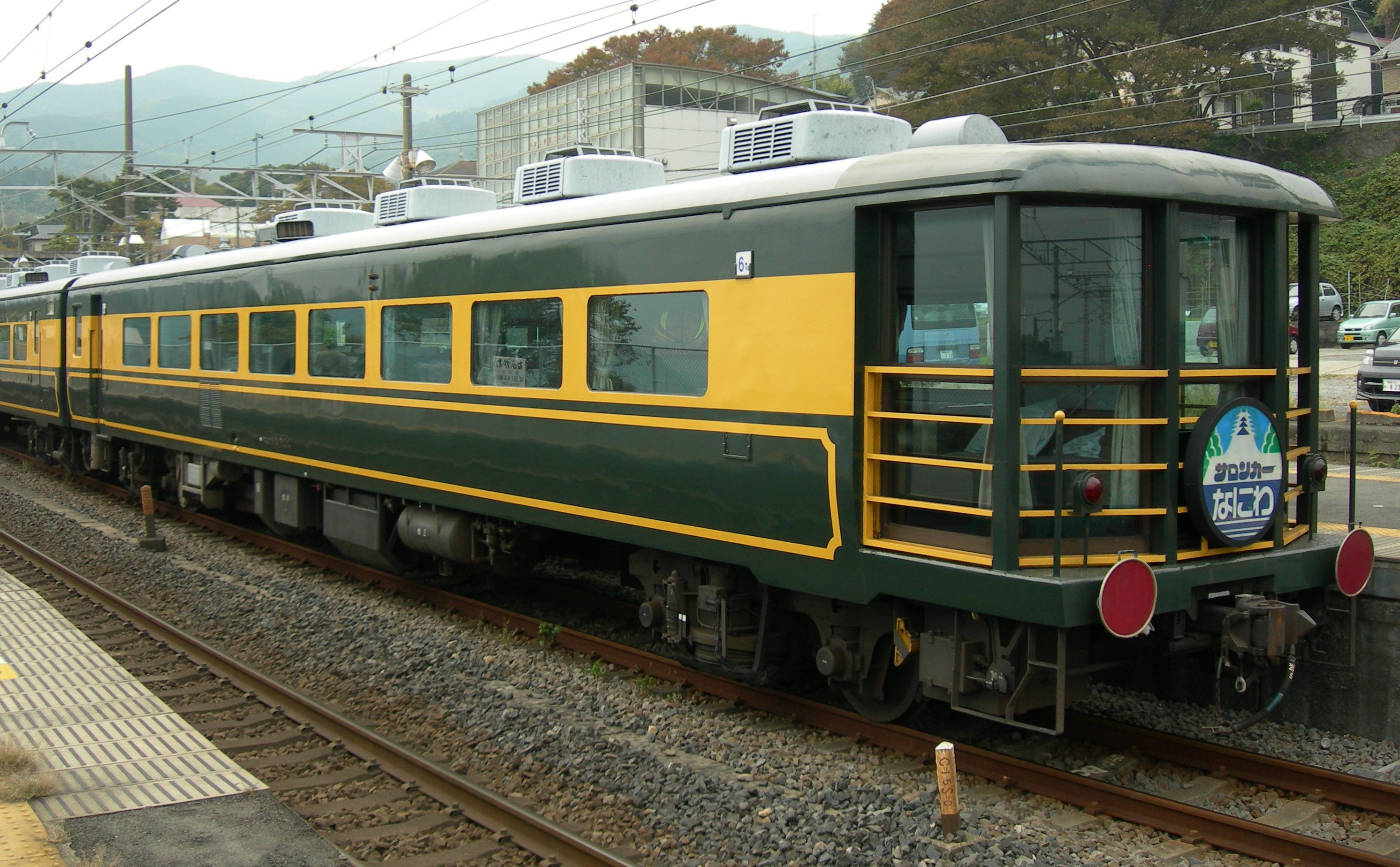 JR西日本 スロフ14 704